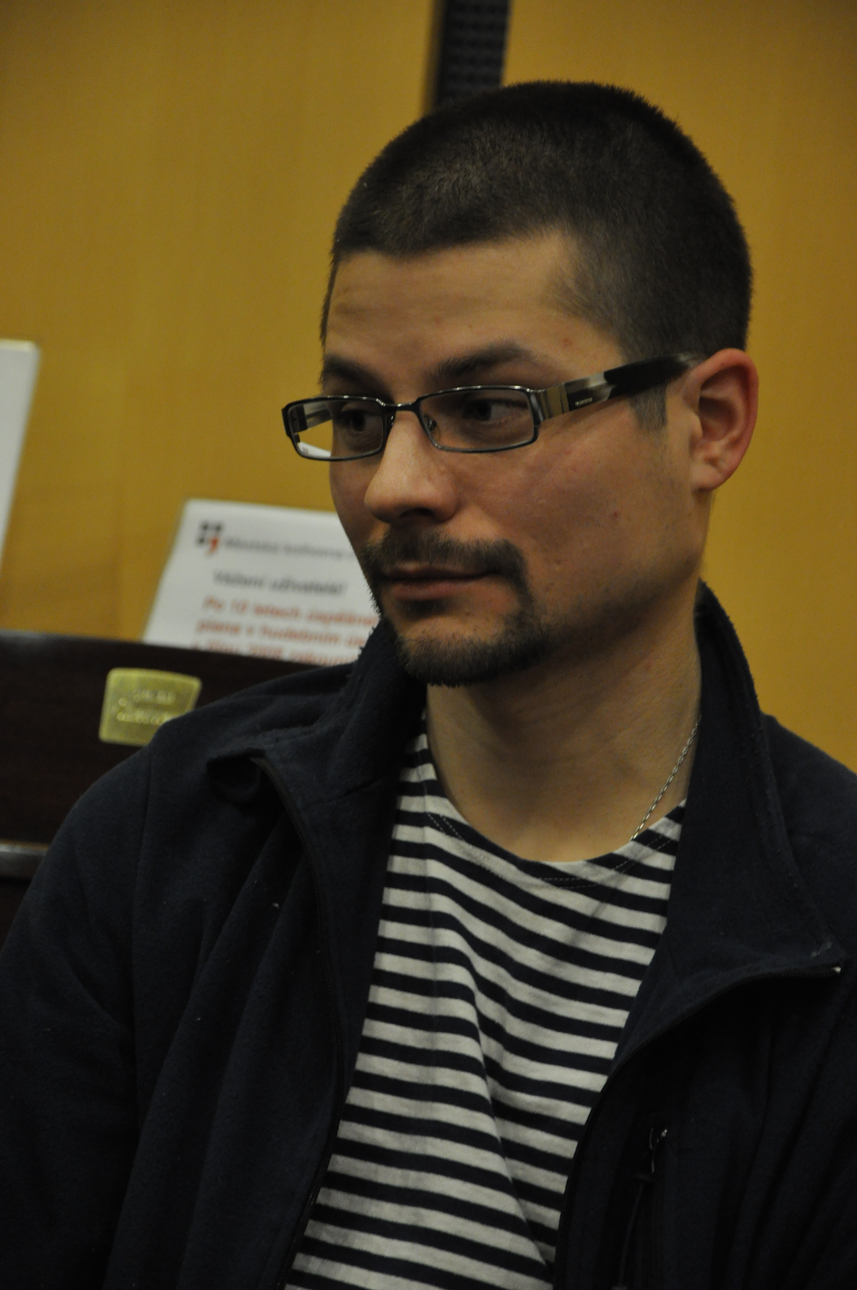 Slavomír Hořínka na besedě s mladými skladateli v Městské knihovně v Praze